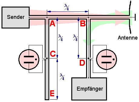 Schaltung eines Branch-Duplexers